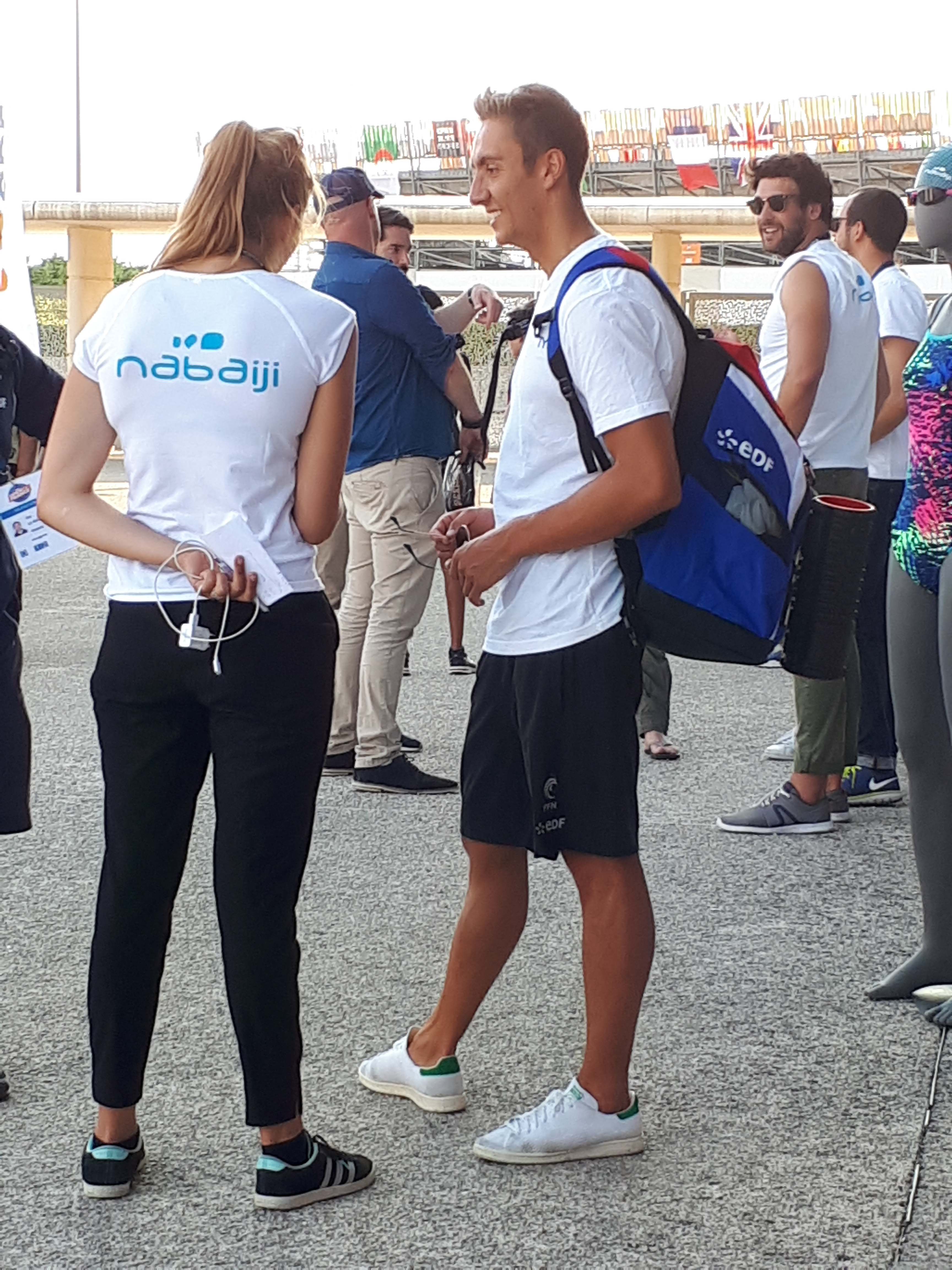 Open de France de Natation 2018 à Chartres. Jordan Pothain discute.